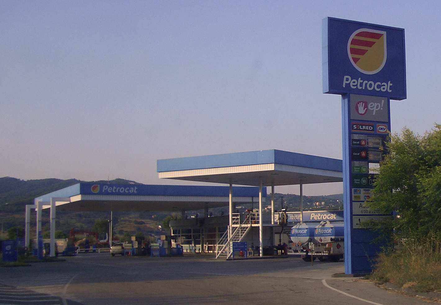 Benzinera Petrocat a Atgentona (El Maresme, Catalunya)